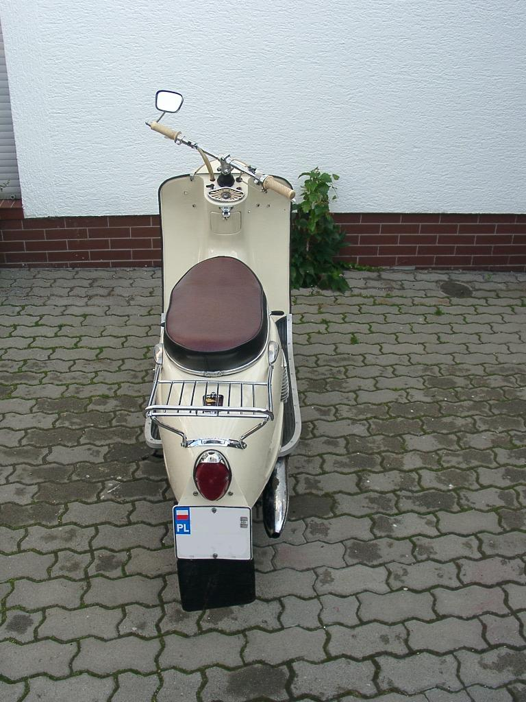 WFM OSA od tyłu.